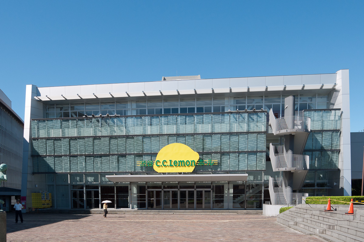 渋谷公会堂（渋谷CC-Lemonホール）、渋谷区宇田川町。